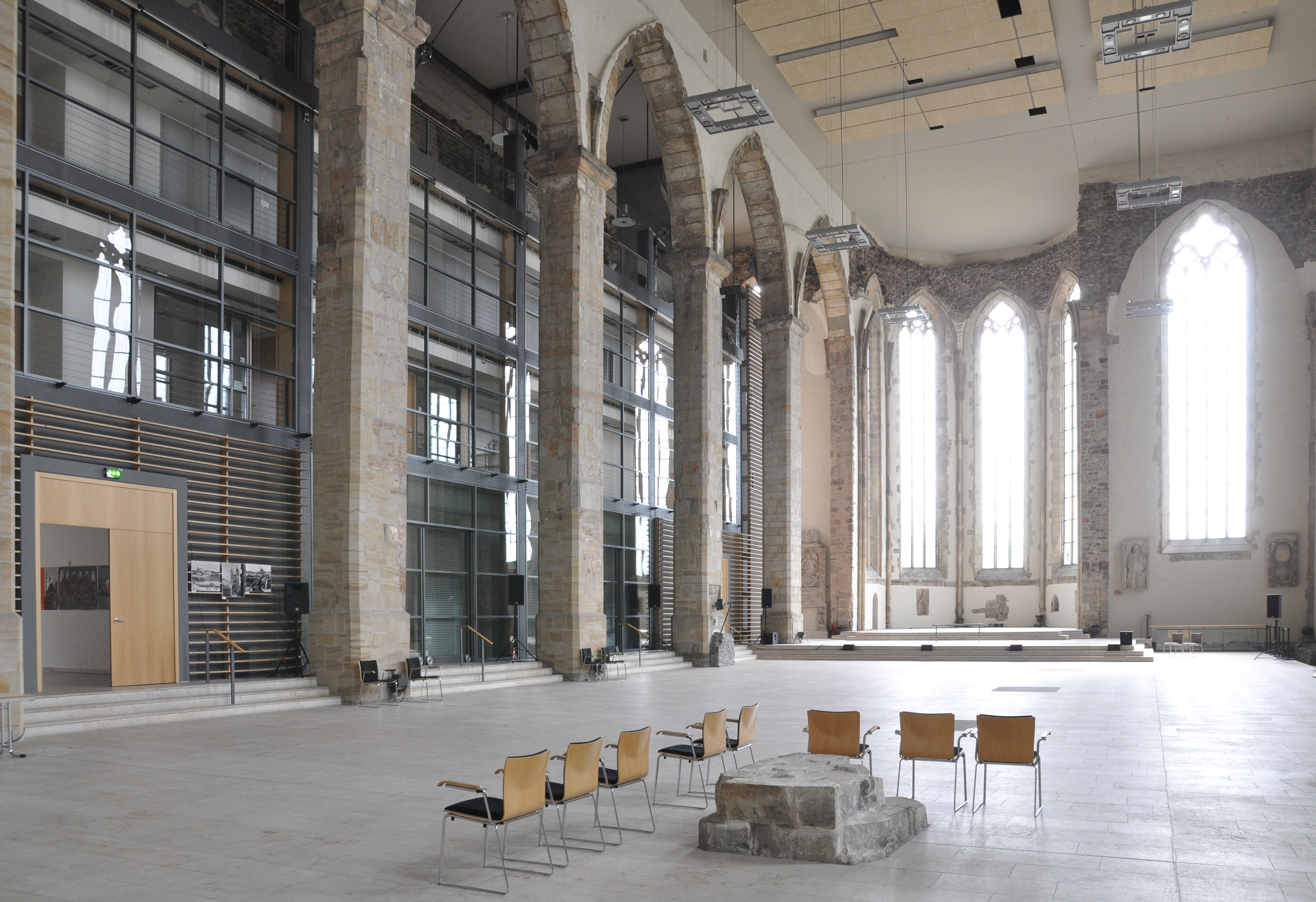 Innenraum nach Nordosten